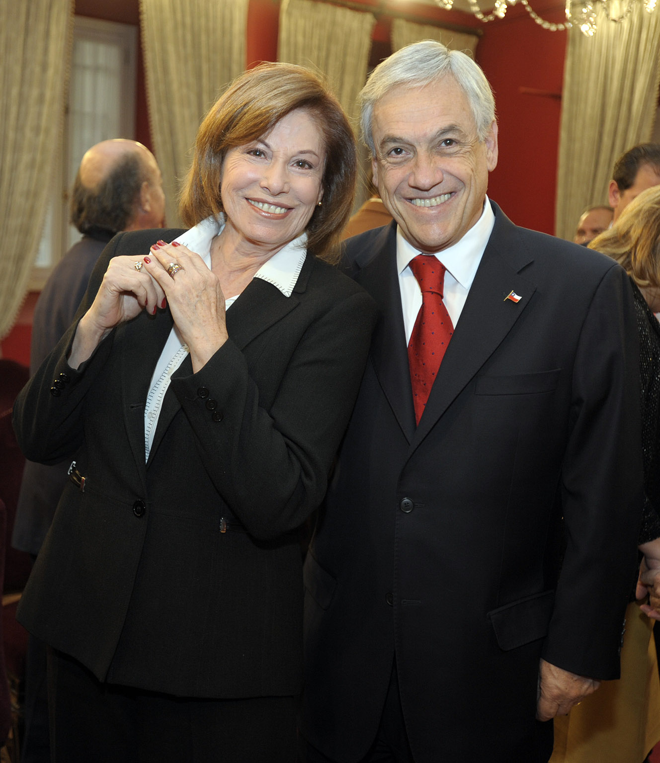 Ginette Acevedo junto al Presidente de Chile Sebastián Piñera.